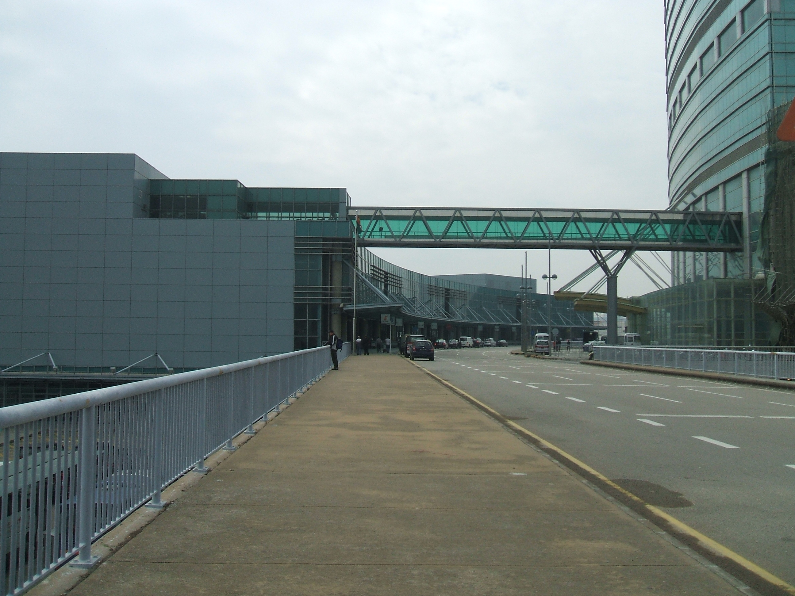 澳門国際空港ターミナルビル